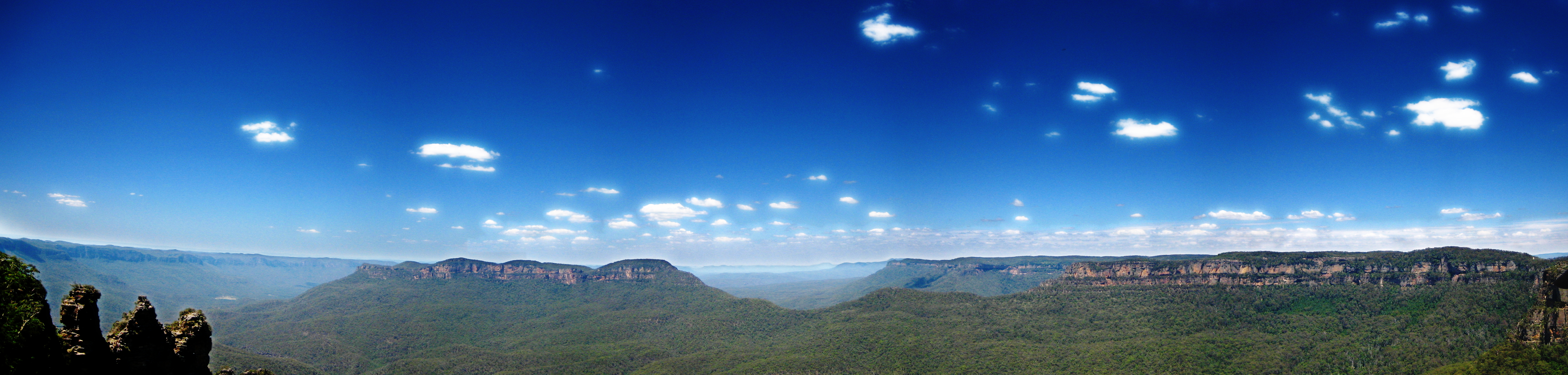 Vue panoramique des Blue Mountains en Australie